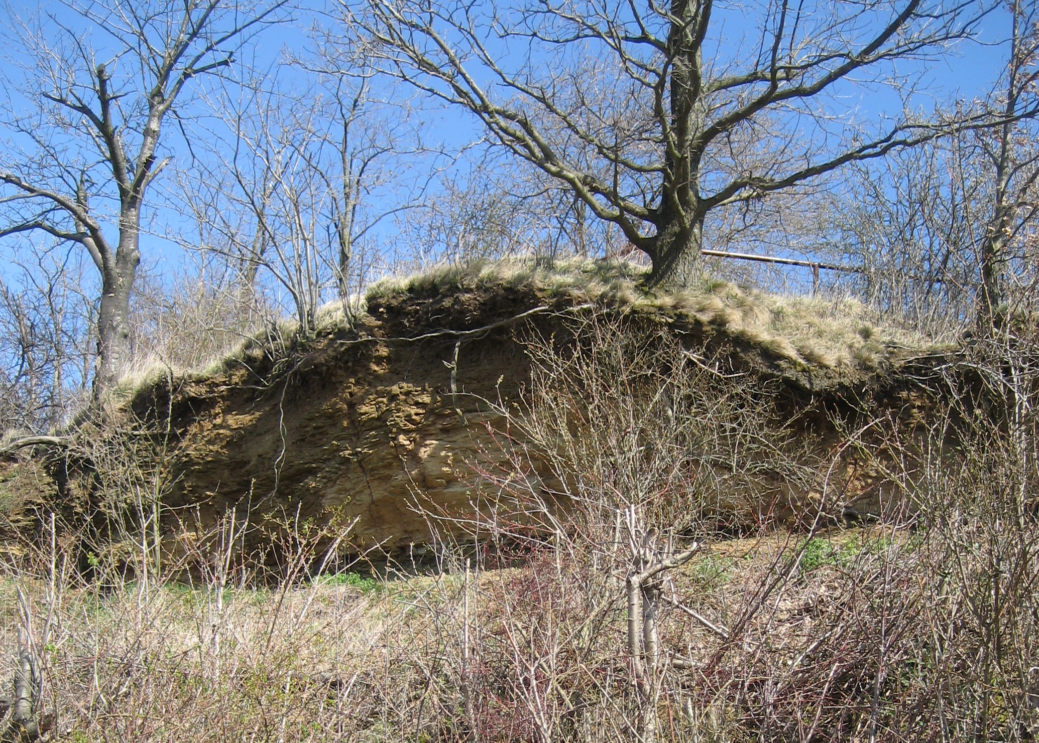 Öhringen Keuperaufschluss am Golberg (SW-Hang)